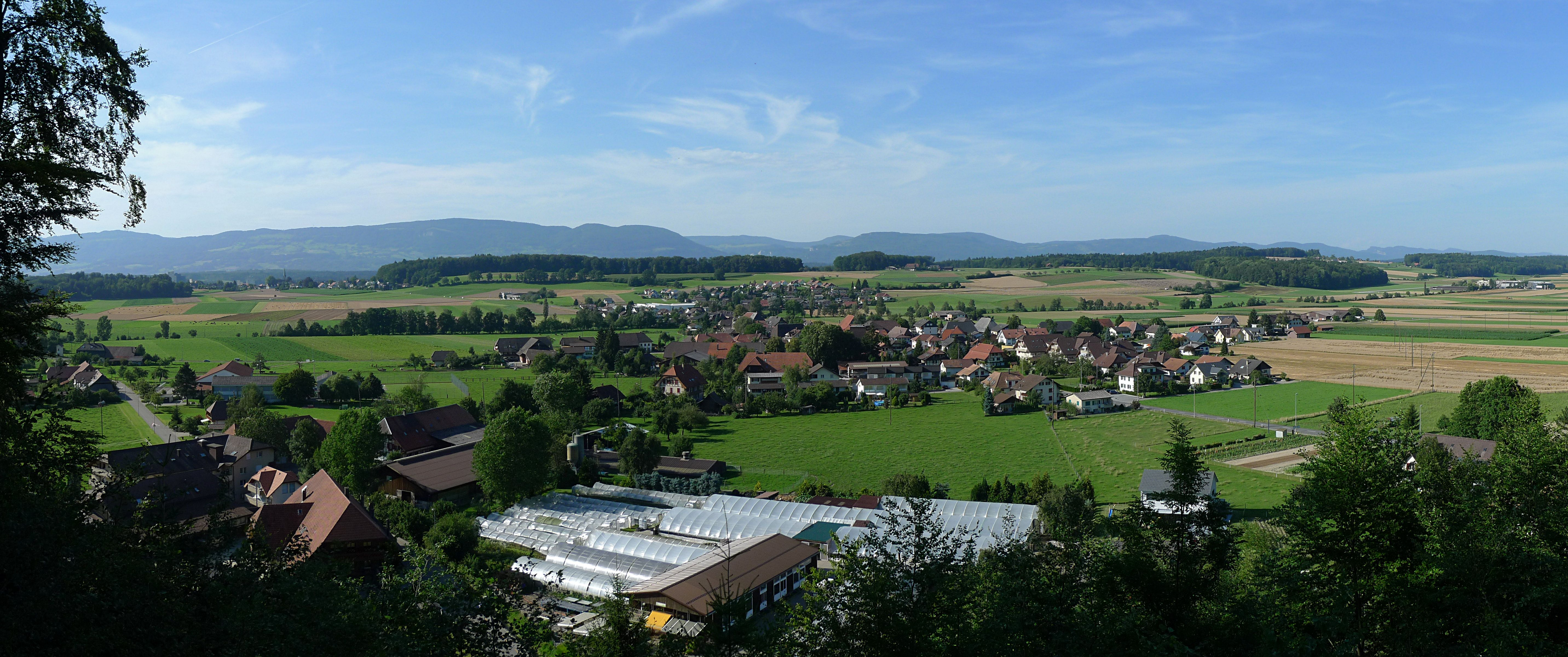 Thörigen im Kanton Bern Schweiz, aus Süden Richtung Norden blickend